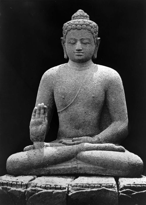 Negatief. Boeddhabeeld van de Borobudur, voorstellende Dhyani Boeddha Amogasiddha